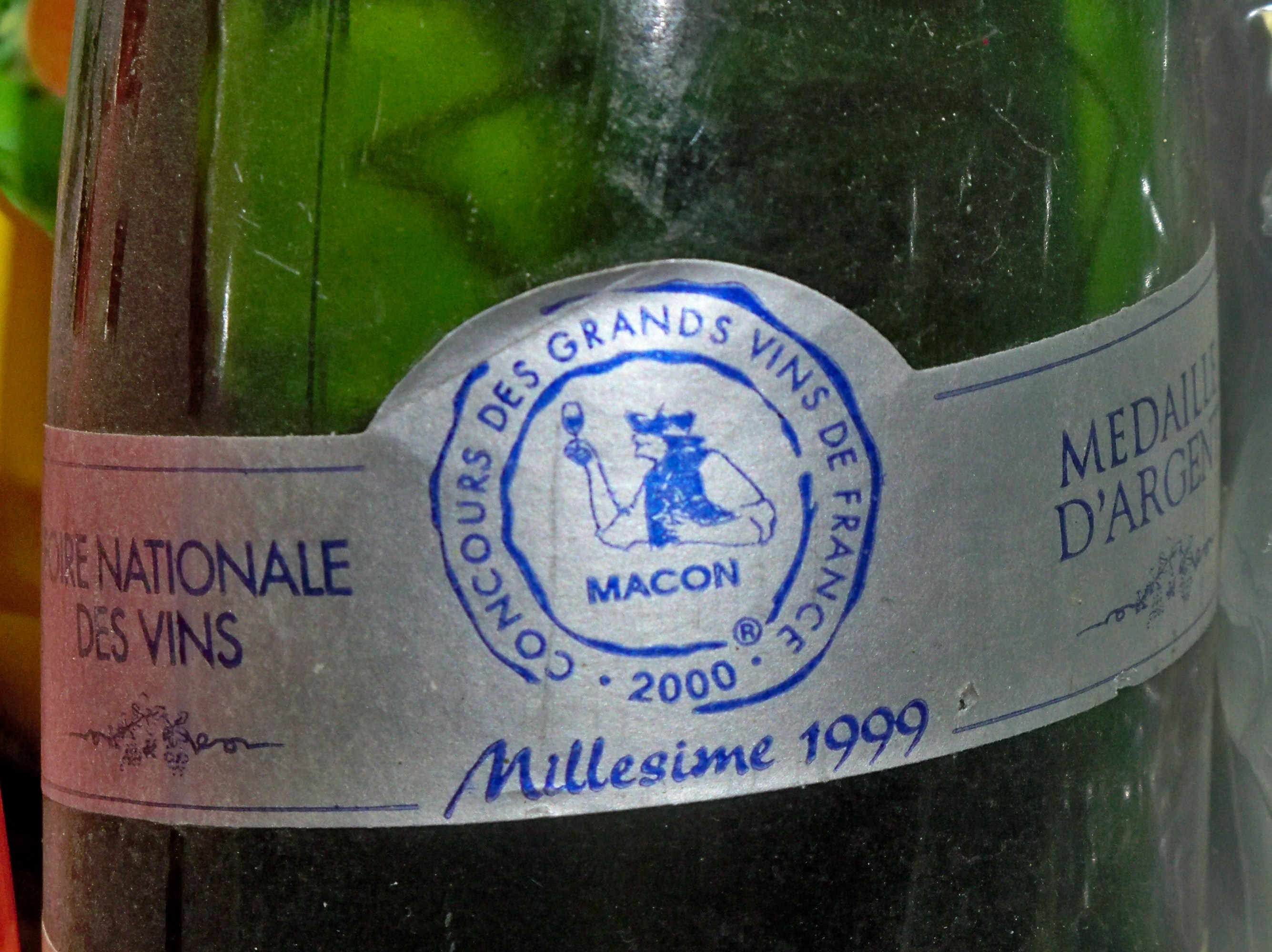 Médaille d'argent au concours des vins de France d Macon (71)